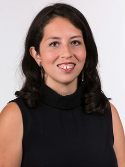 Gael Fernanda Yeomans Araya en la fotografía oficial de diputados periodo 2018-2022. (Fotos: Christel Andler, René Lescornez, Johanna Zárate)